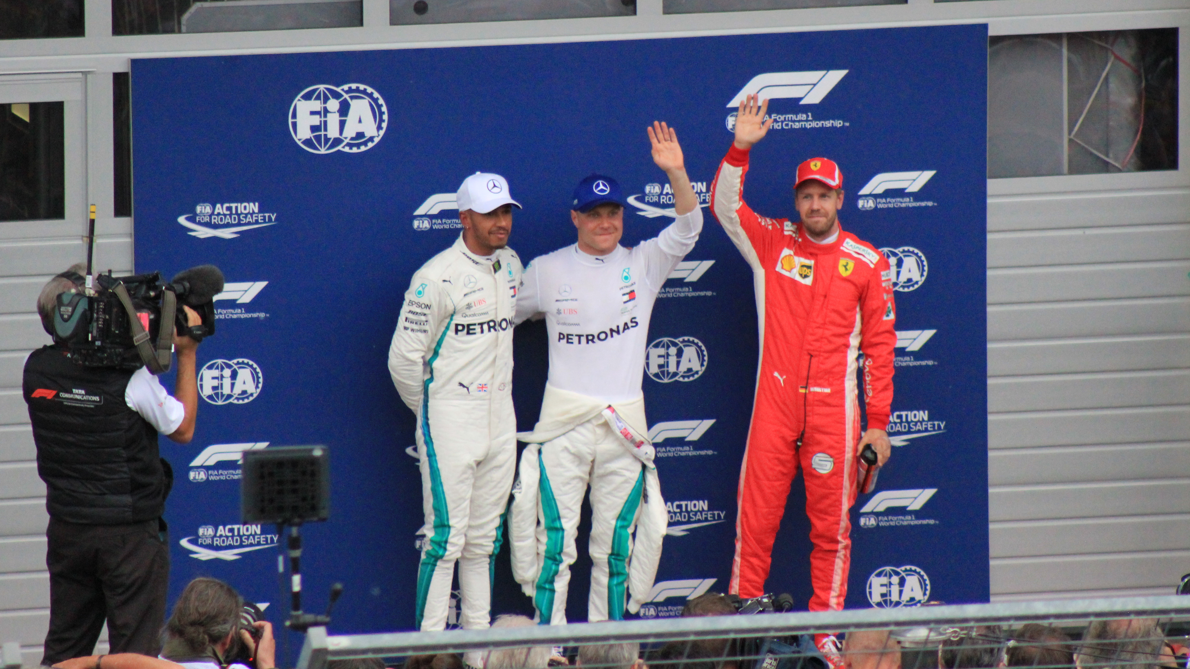 Die Top-3 des Qualifyings